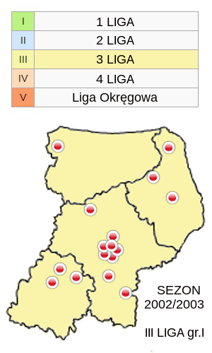 Jagiellonia Białystok w sezonie 2002/2003 -mapka